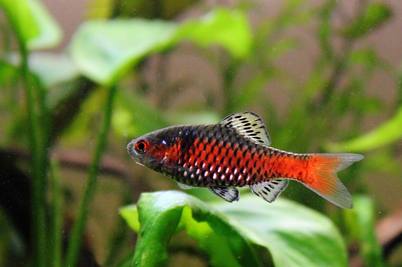 Puntius (Pethia) padamya (male). This species has frequenly been confused with Puntius (Pethia) ticto